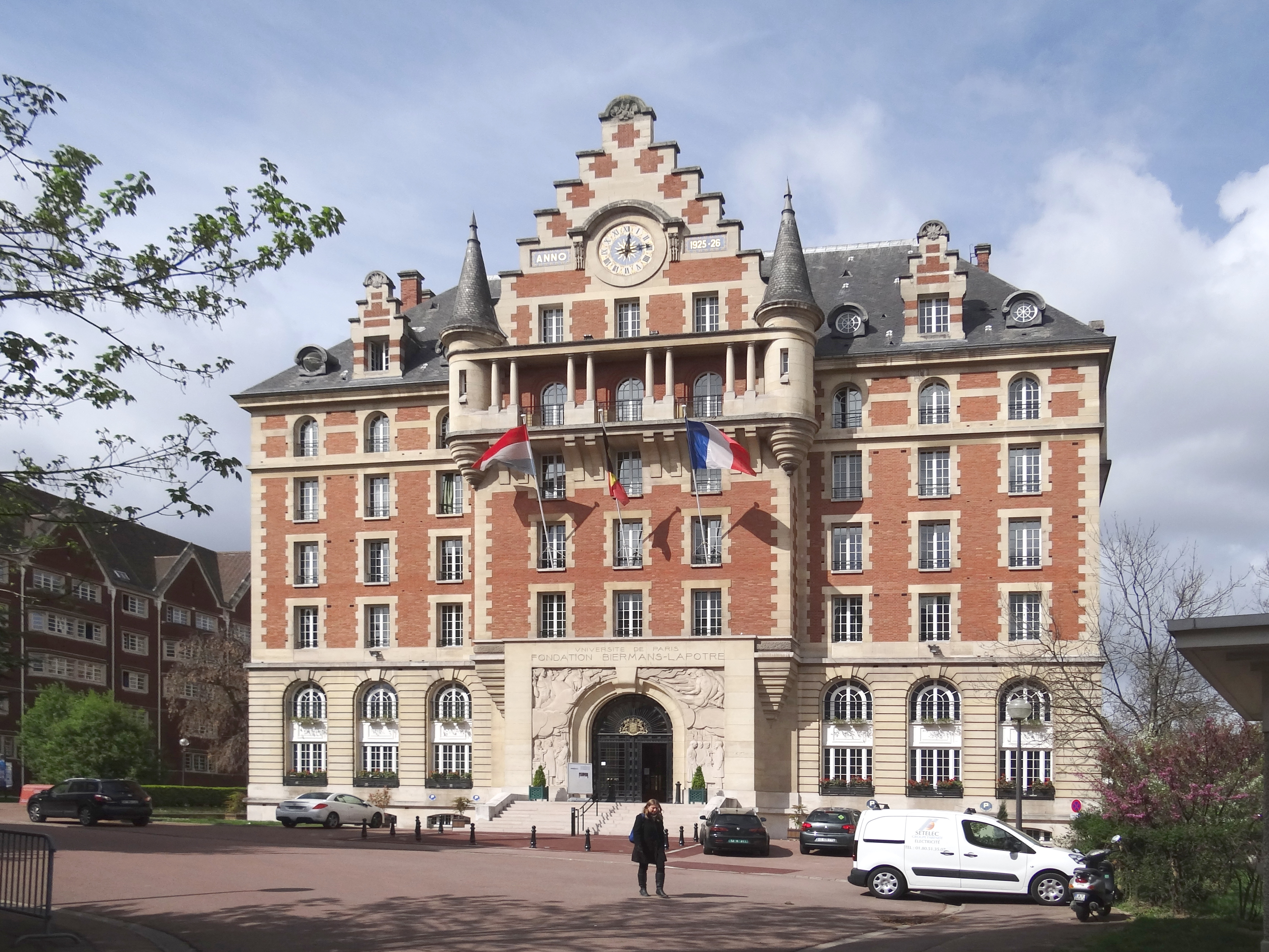 Fondation Bermans-Lapotre - Cité Universitaire - Paris.